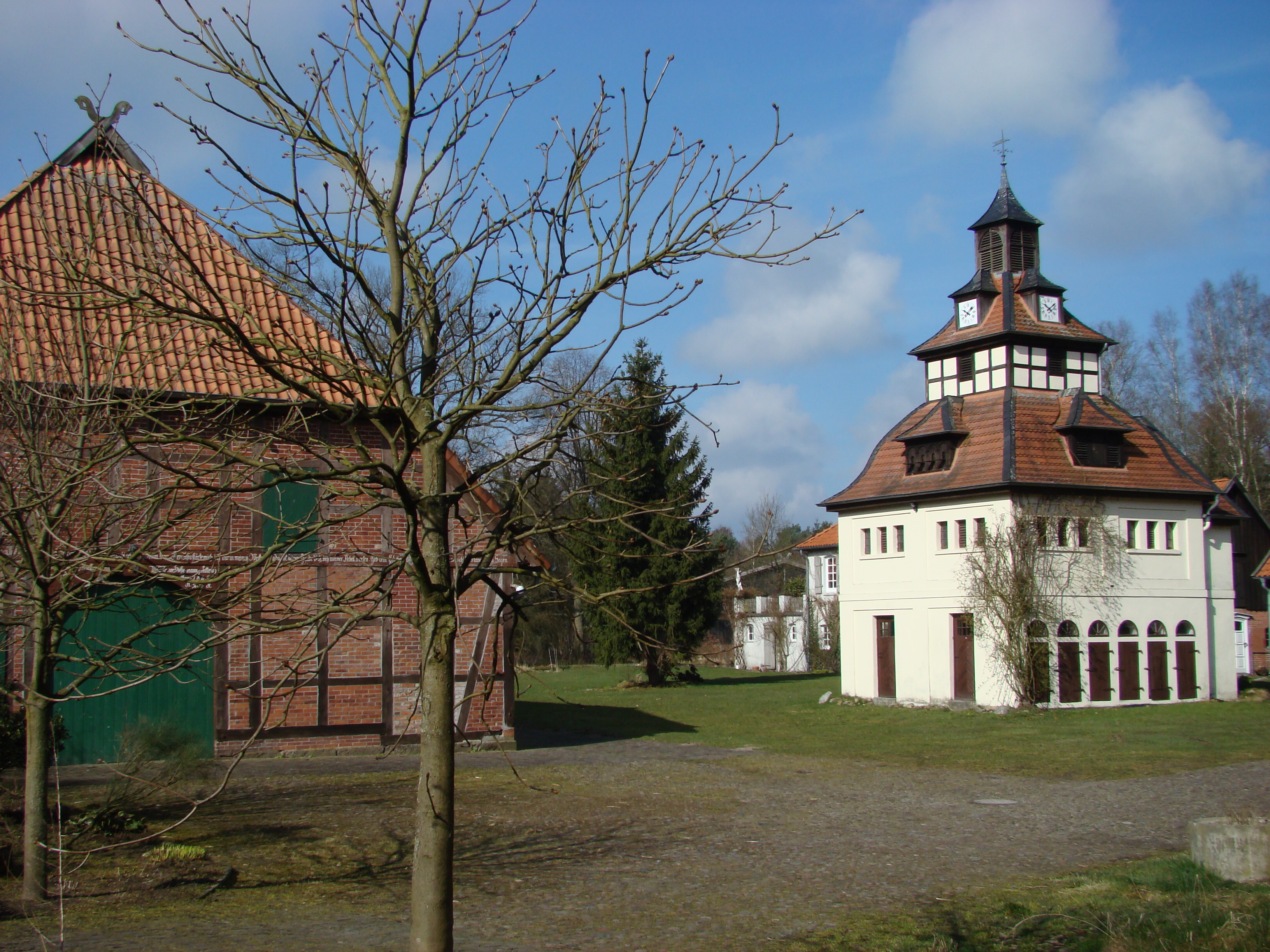 ehem."Behrenscher Hof" mit historischem denkmalgeschütztem Taubenschlag